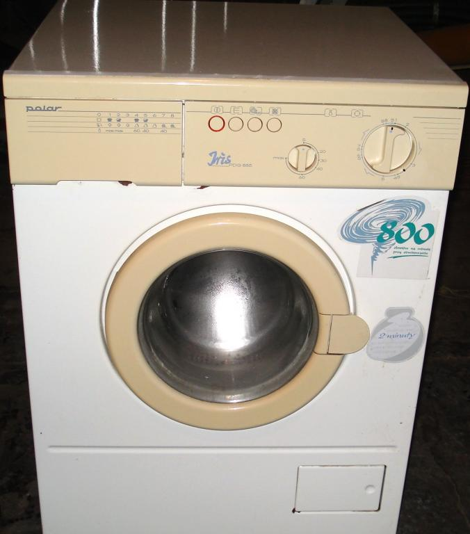 A oto pralka Polar PDG 885 "Iris" - jedna z pierwszych polskich pralek wysokoobrotowych. Przede wszystkim proszę zwrócić uwagę na dwie naklejki na pralce, na których piszę "2 minuty" i "800 obrotów na minutę"